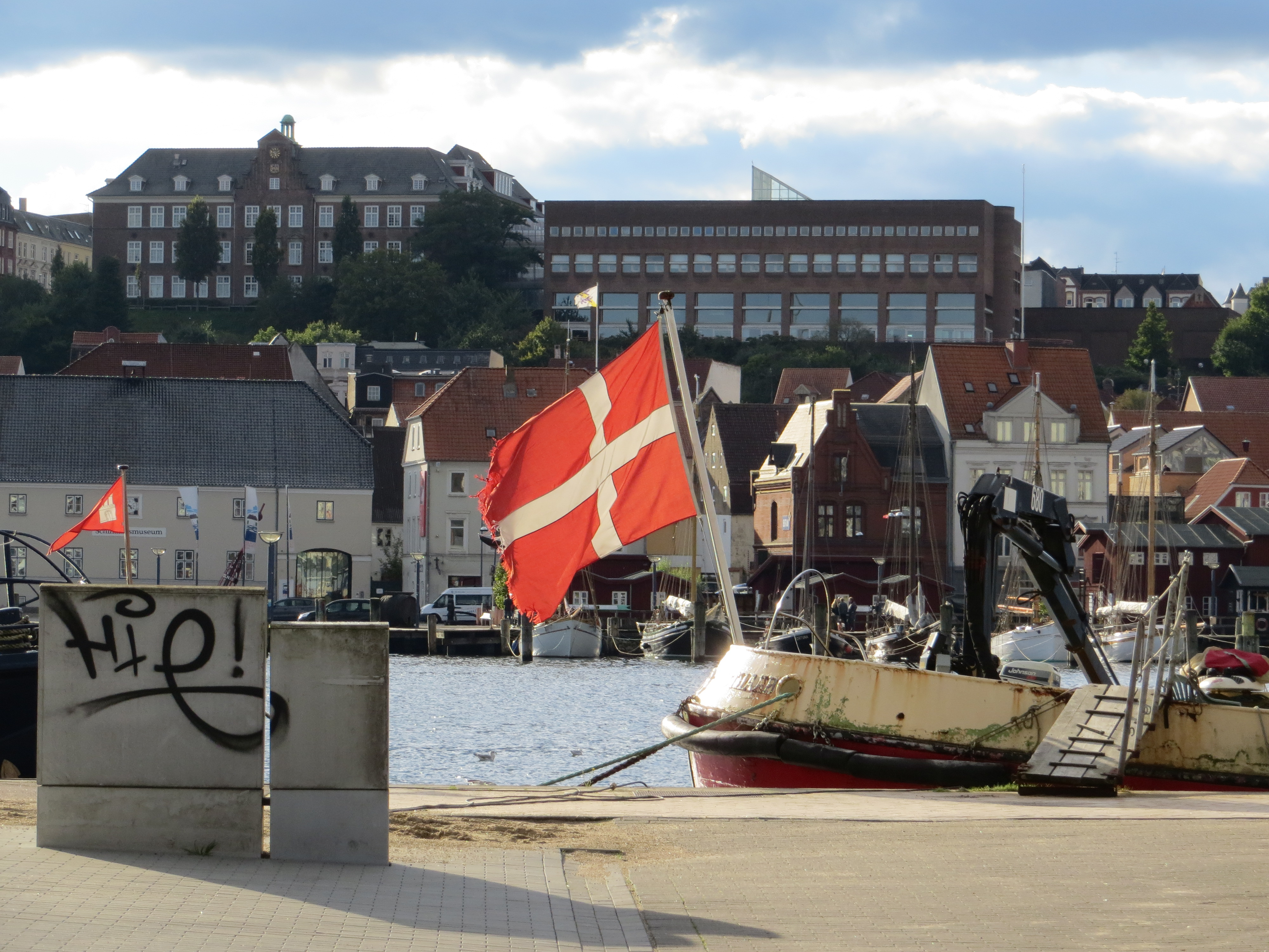 Schiff im Hafen mit dänischer Fahne und der Duborg-Skolen im Hintergrund (Flensburg 2013), Bild 04